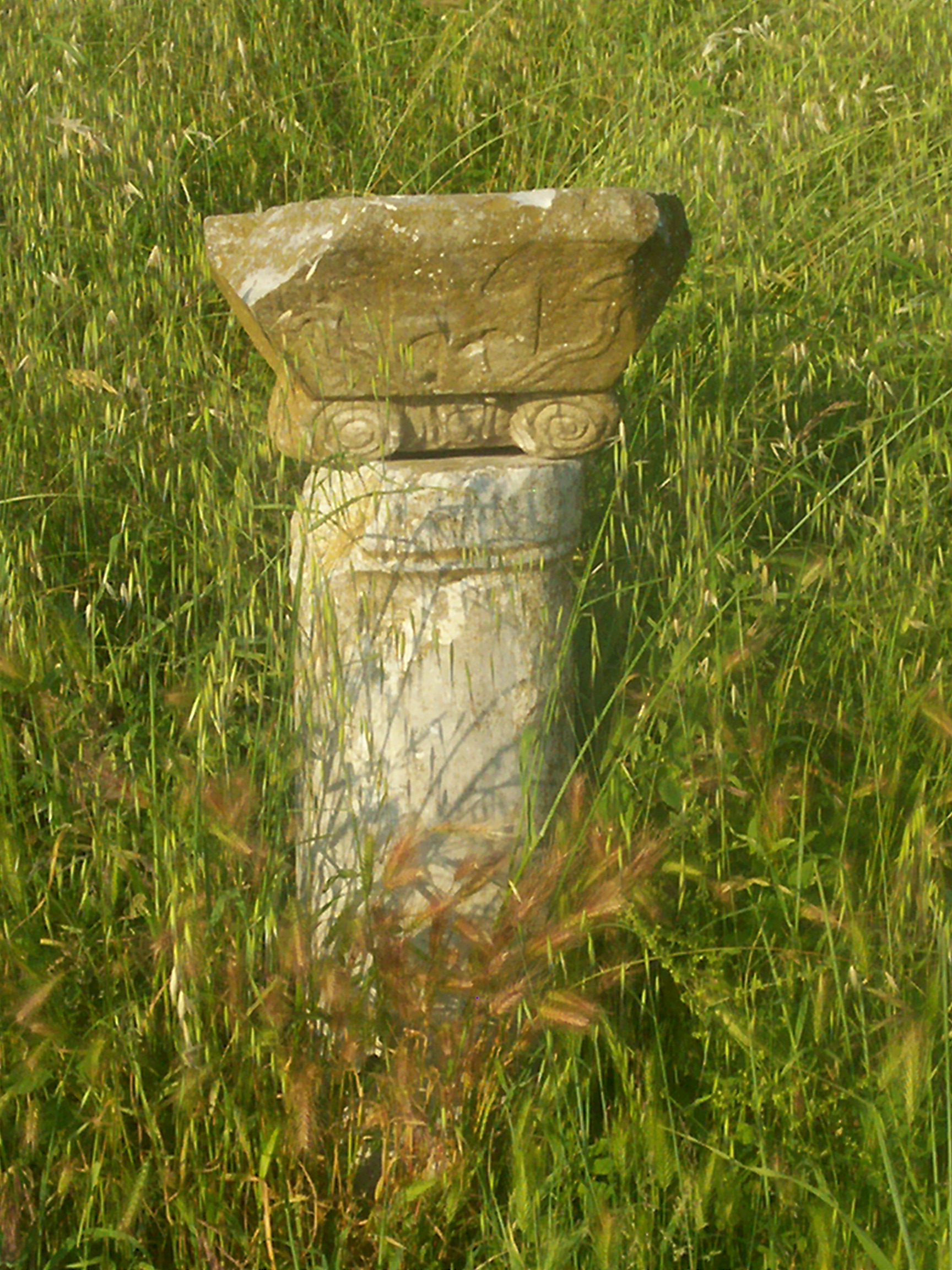 Bazilika e Shëmëhillit në Arapaj, Durrës